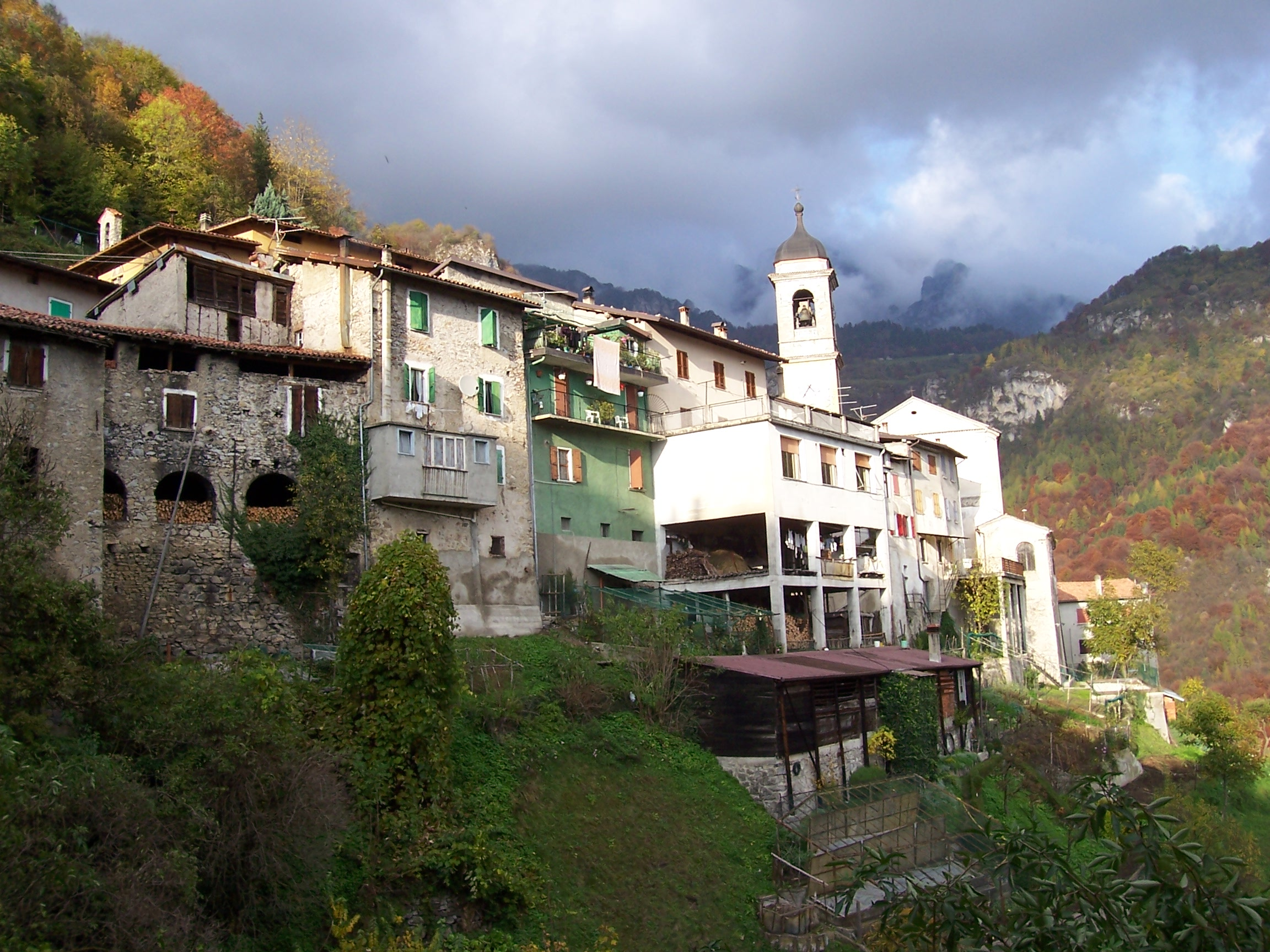 veduta di magasa